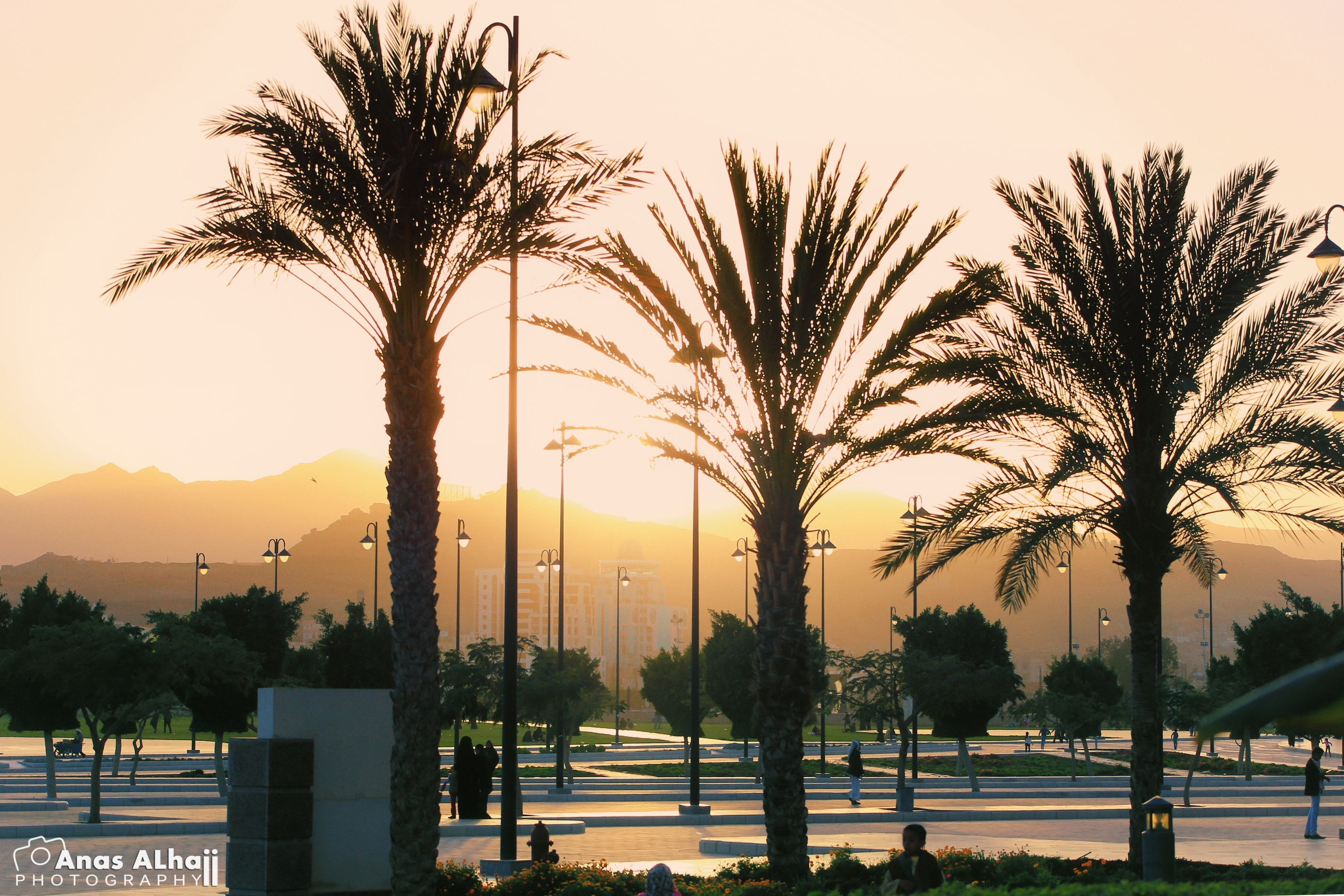 By: AnasALhajj.Photography